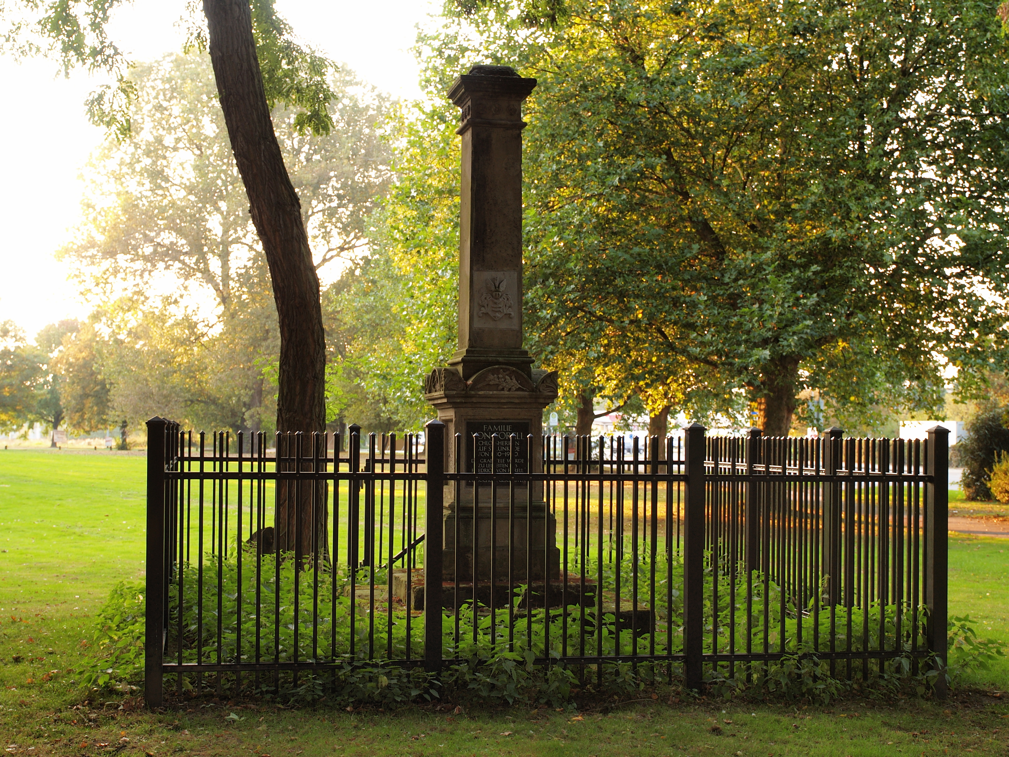 Grabdenkmal der Familie von Forell, ehemals Besitzer des Schlosses Strünkede in Herne, am Rande des Schlossparks gelegen